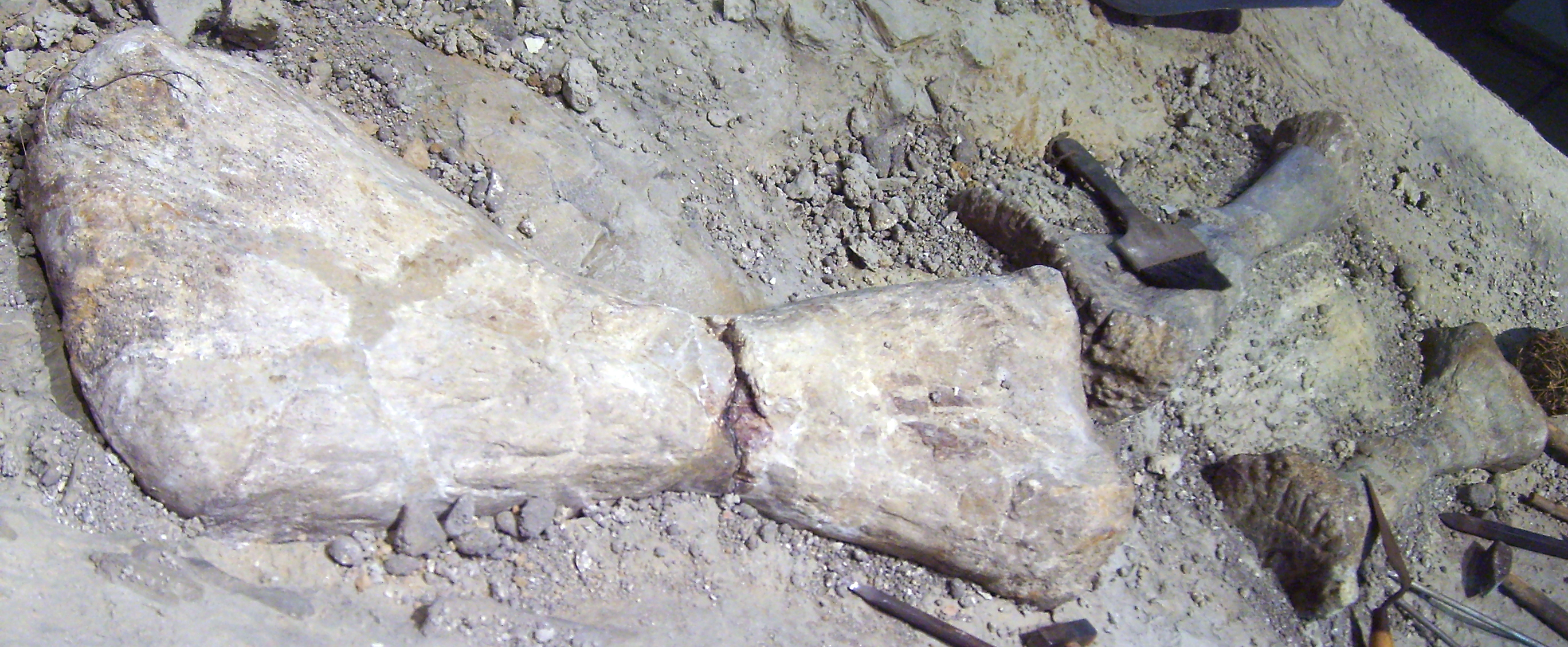 Janenschia humerus, radius and ulna at the Museum für Naturkunde, Berlin.